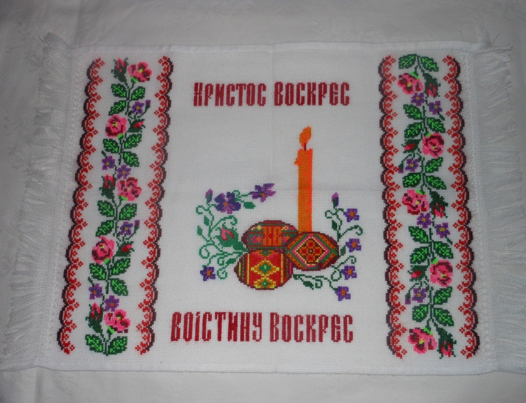 рушник 10